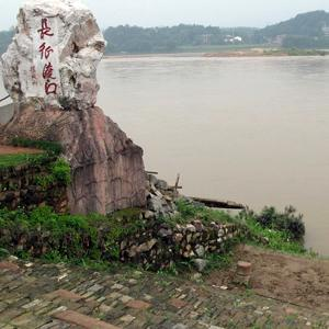 中央红军长征的第一个渡口